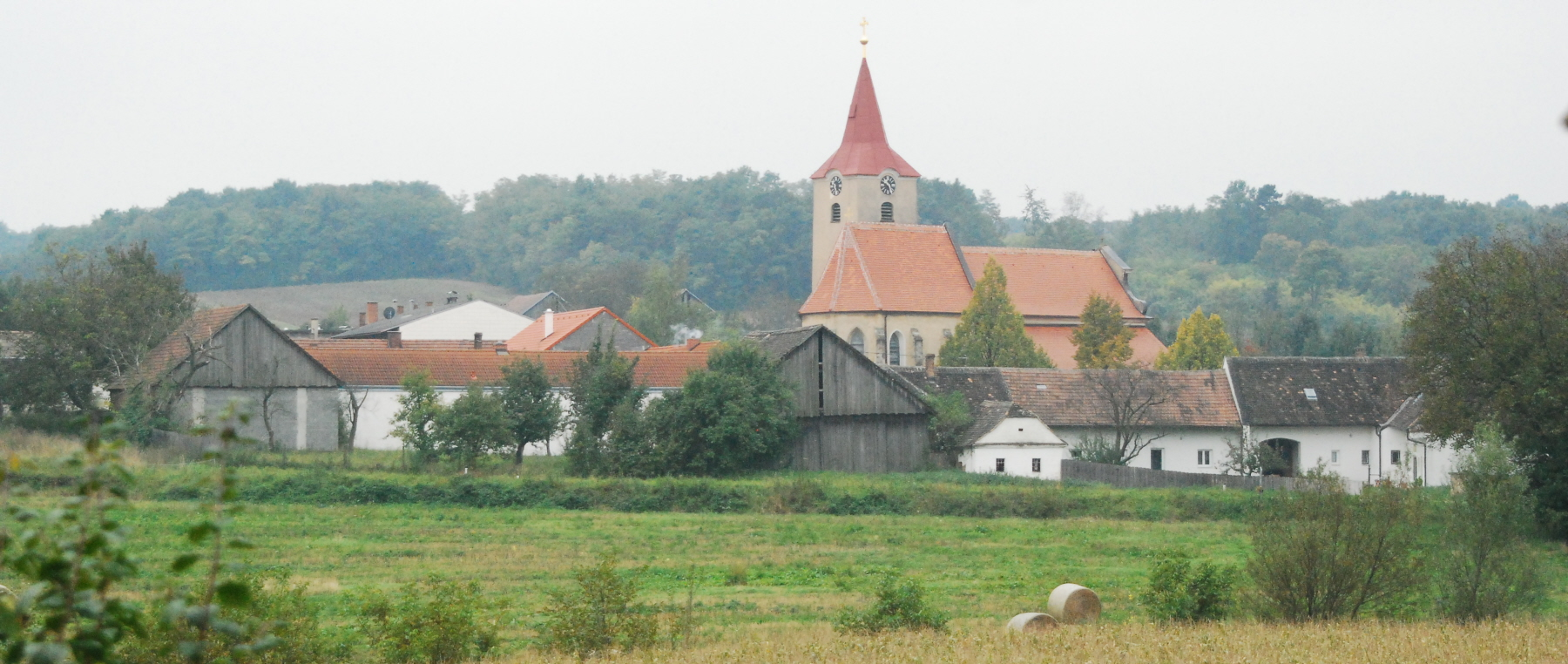 Ortsansicht von Groß bei Hollabrunn in Niederösterreich